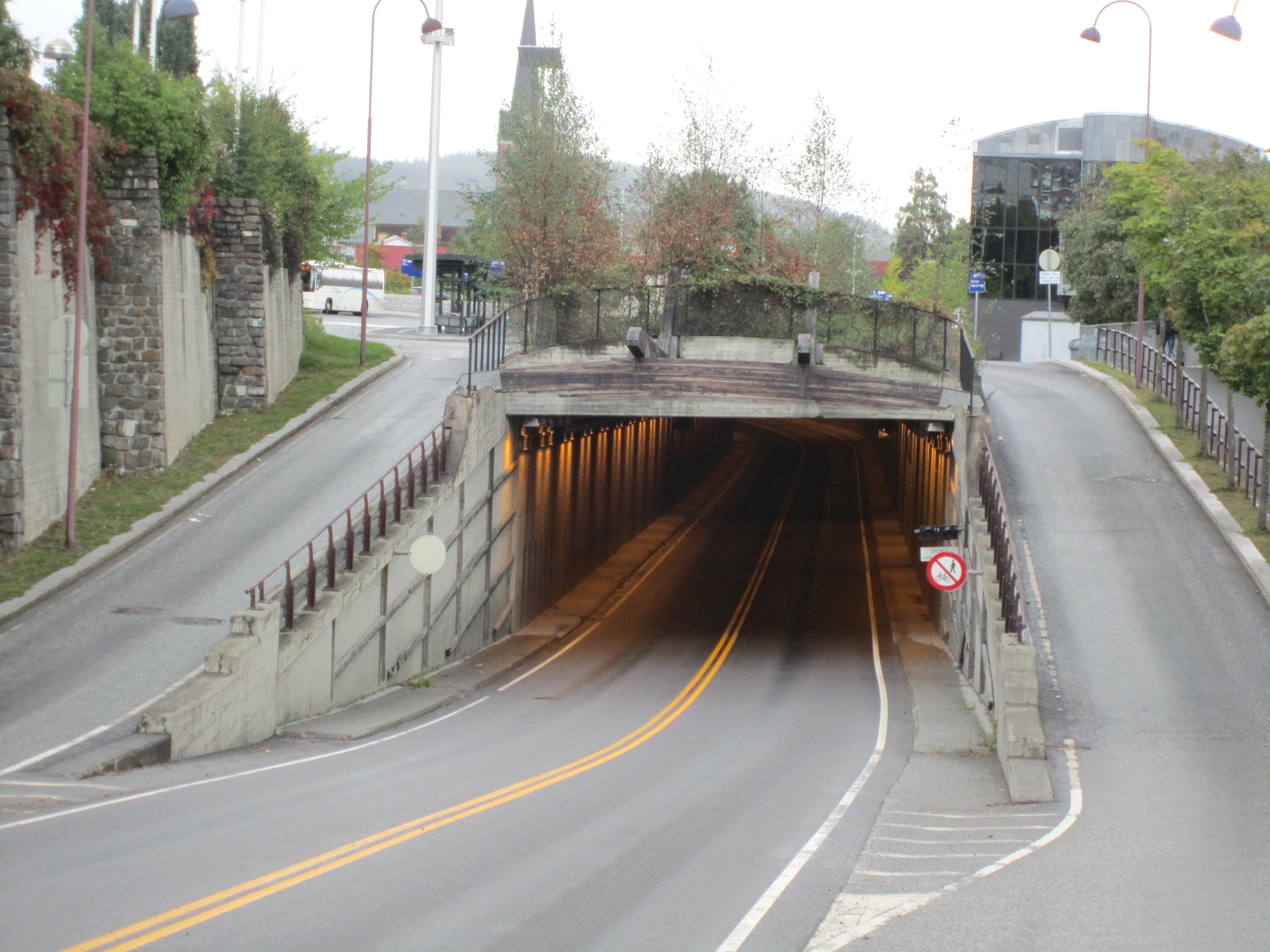 Jernbanetorgtunnelen på Lillehammer nordfra